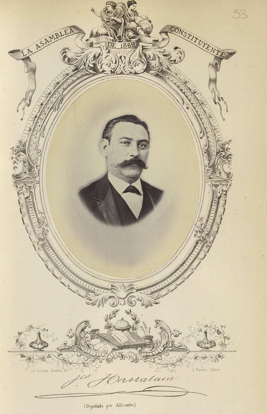 Francisco Javier Carratalá Utrilla, fotografía de José Suárez, orla de Litografía Sánchez. Inscripción: "La Asamblea Constituyente de 1989 / [facsímil del autógrafo] / (Diputado por Alicante)". Biblioteca Nacional de España